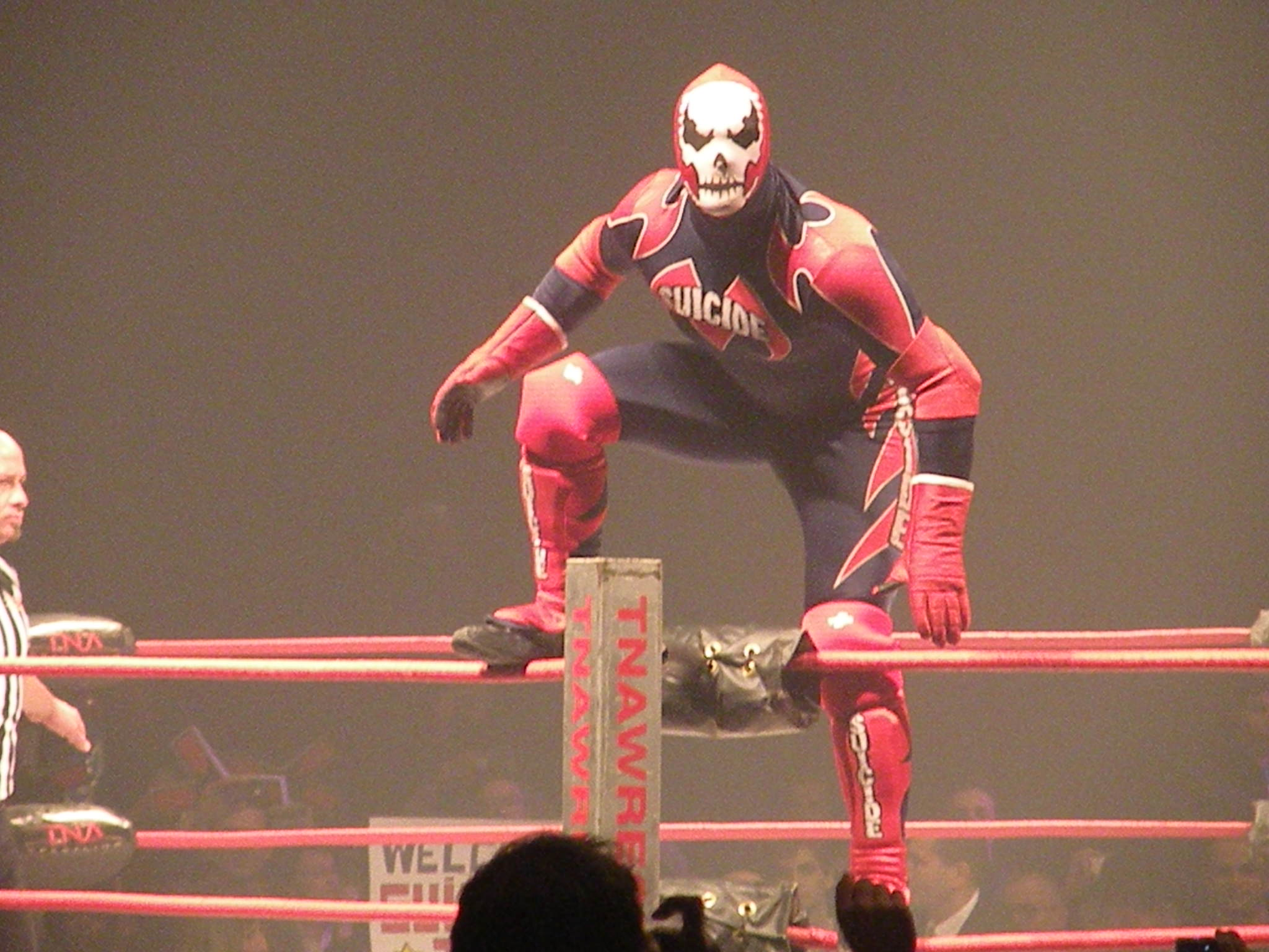 Frankie Kazarian, suicide, tna zenith paris